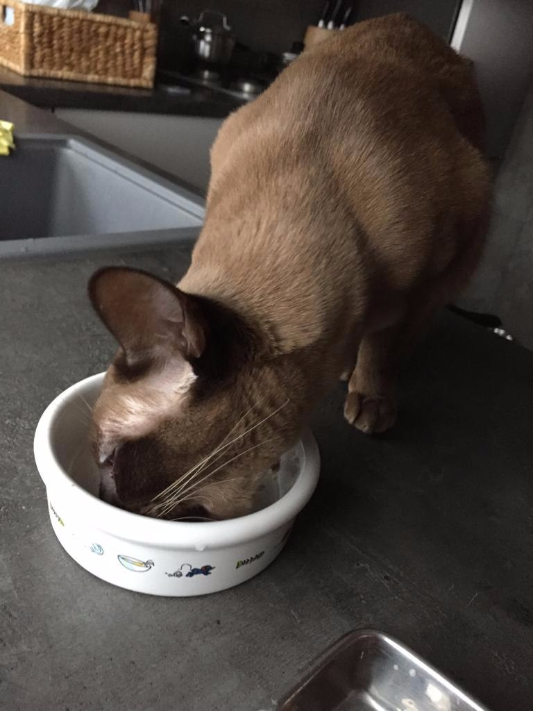 kass sööb